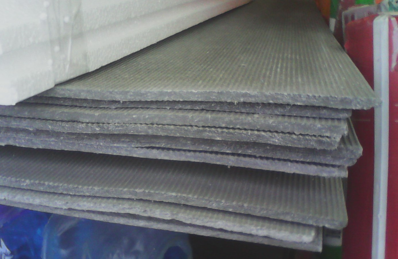 Плоский шифер из асбестоцемента толщиной 6 мм